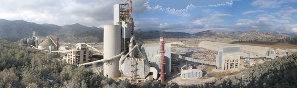 çimento fabrikası kızılkaya